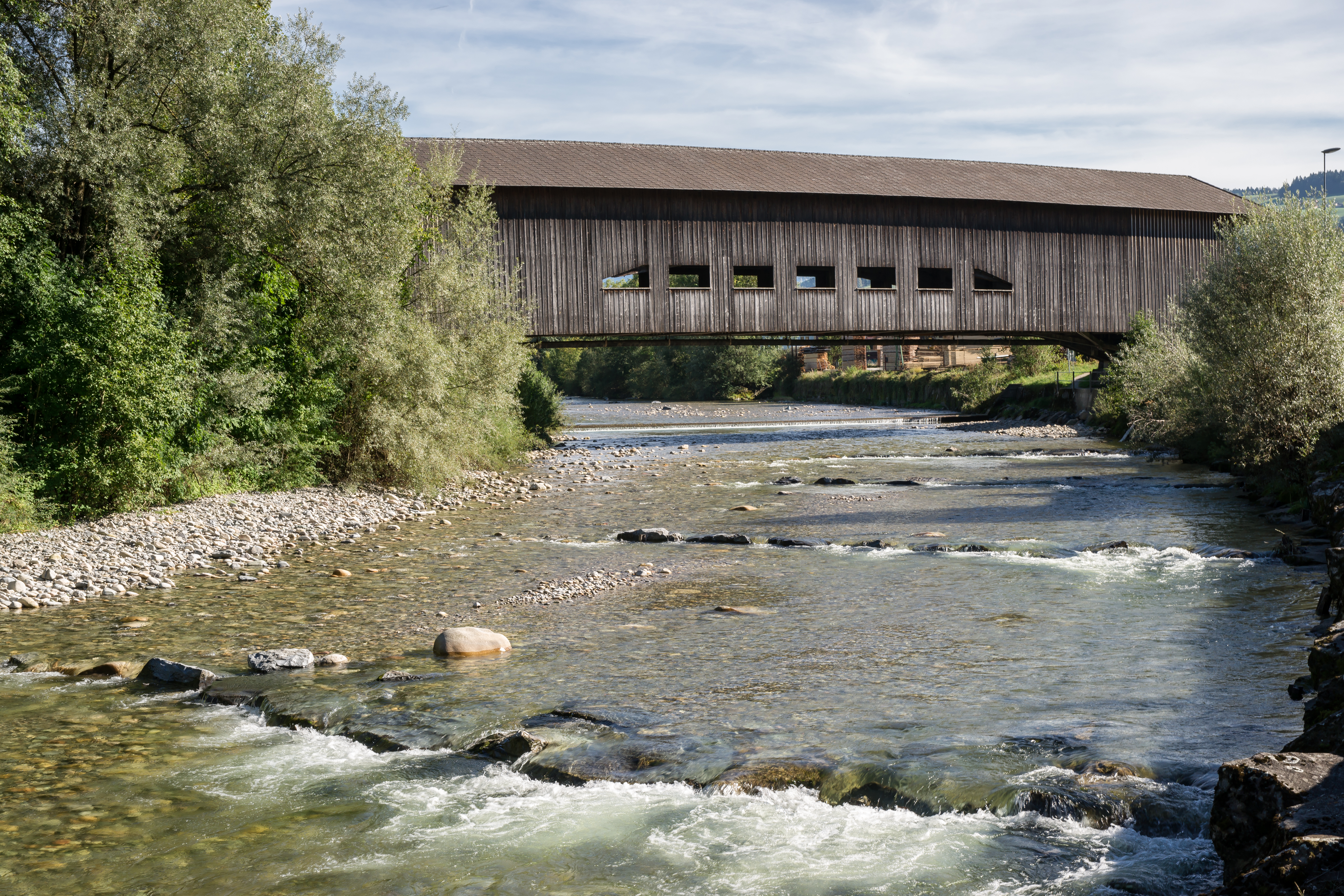 Gedeckte Holzbrücke über die Emme